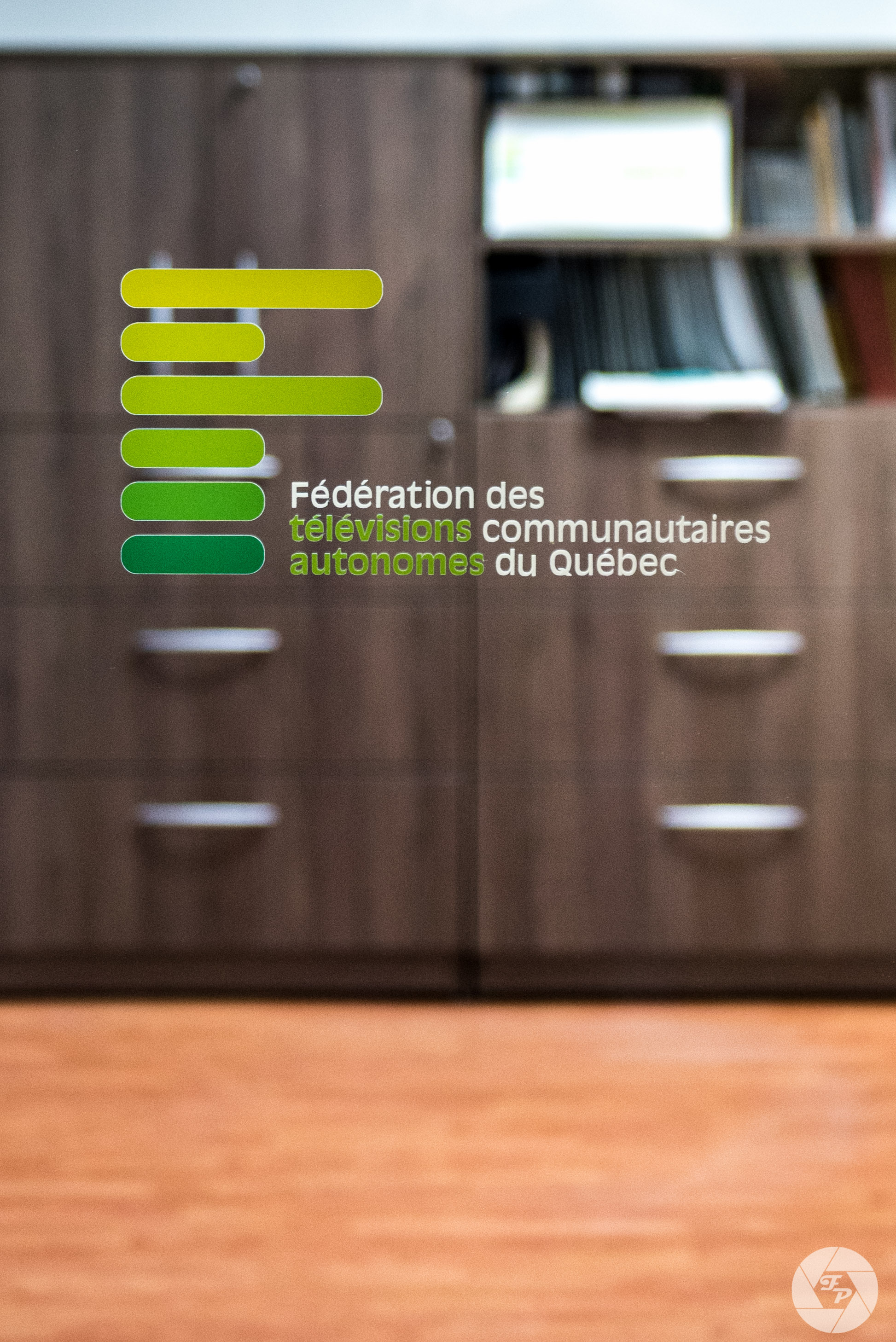 Porte Fédération des TCA du Québec